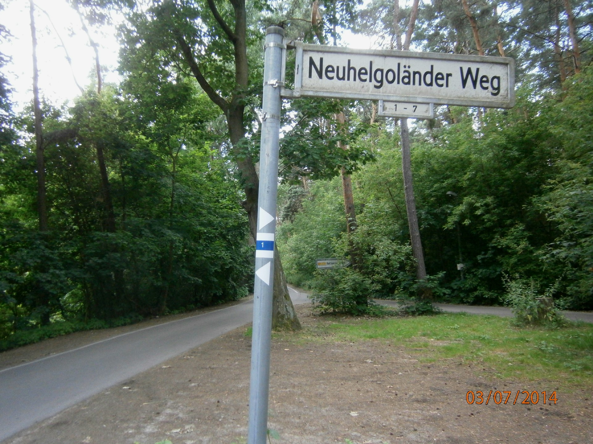 Neuhelgoländer Weg ist eine Straße im Berliner Ortsteil Müggelheim. Hier am Straßeneck vor der Gaststätte Neu-Helgoland führt der Spreeweg/Berliner Urstromtal vorbei, der als Nr. 1 zu den 20 grünen Hauptwegen Berlins gehört..